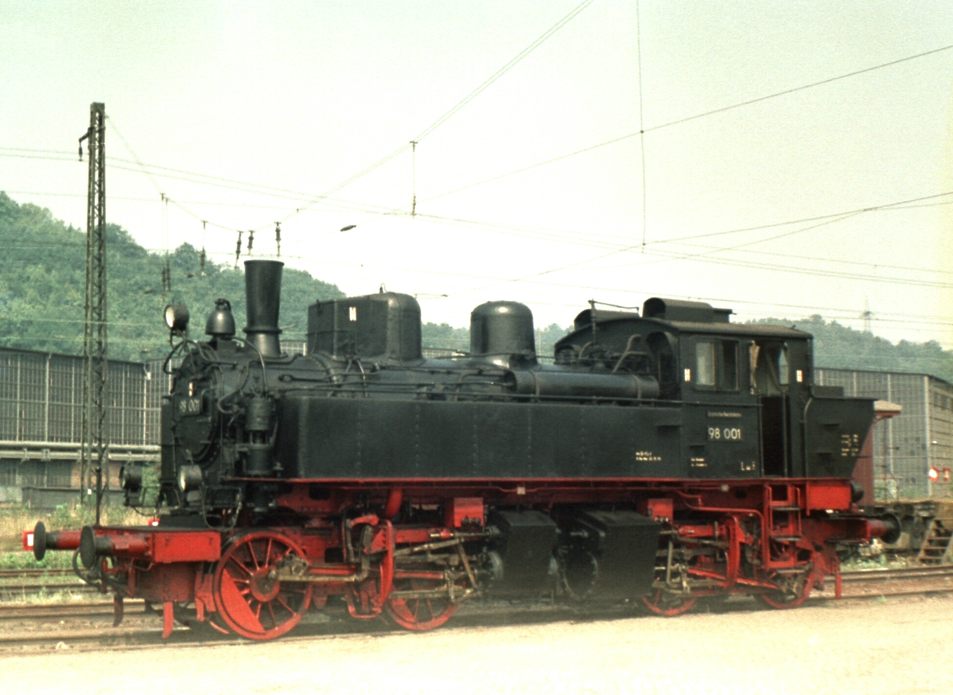 Dampflokomotive 98 001 in Freital-Hainsberg.